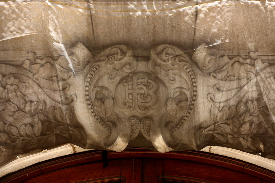 Casa Burés, obra modernista de Francesc Berenguer i Mestres Construïda entre 1900-1905. Llinda de la porta principal amb les inicials FB de Filatures Burés o Francesc Burés.